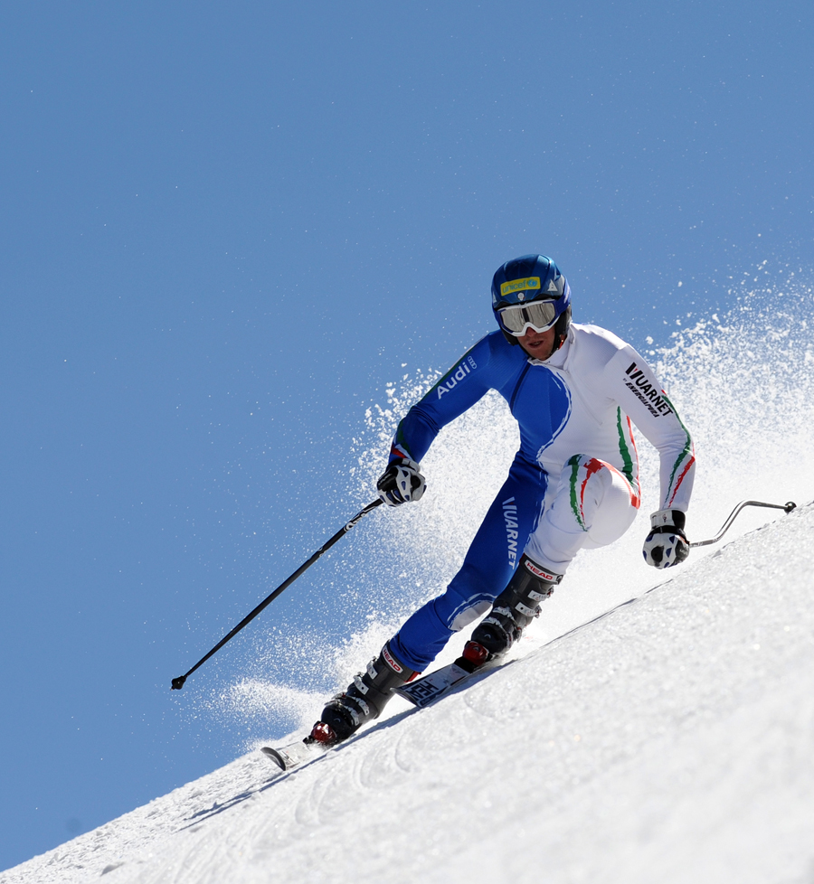 Werner Heel Les Alpes 2010